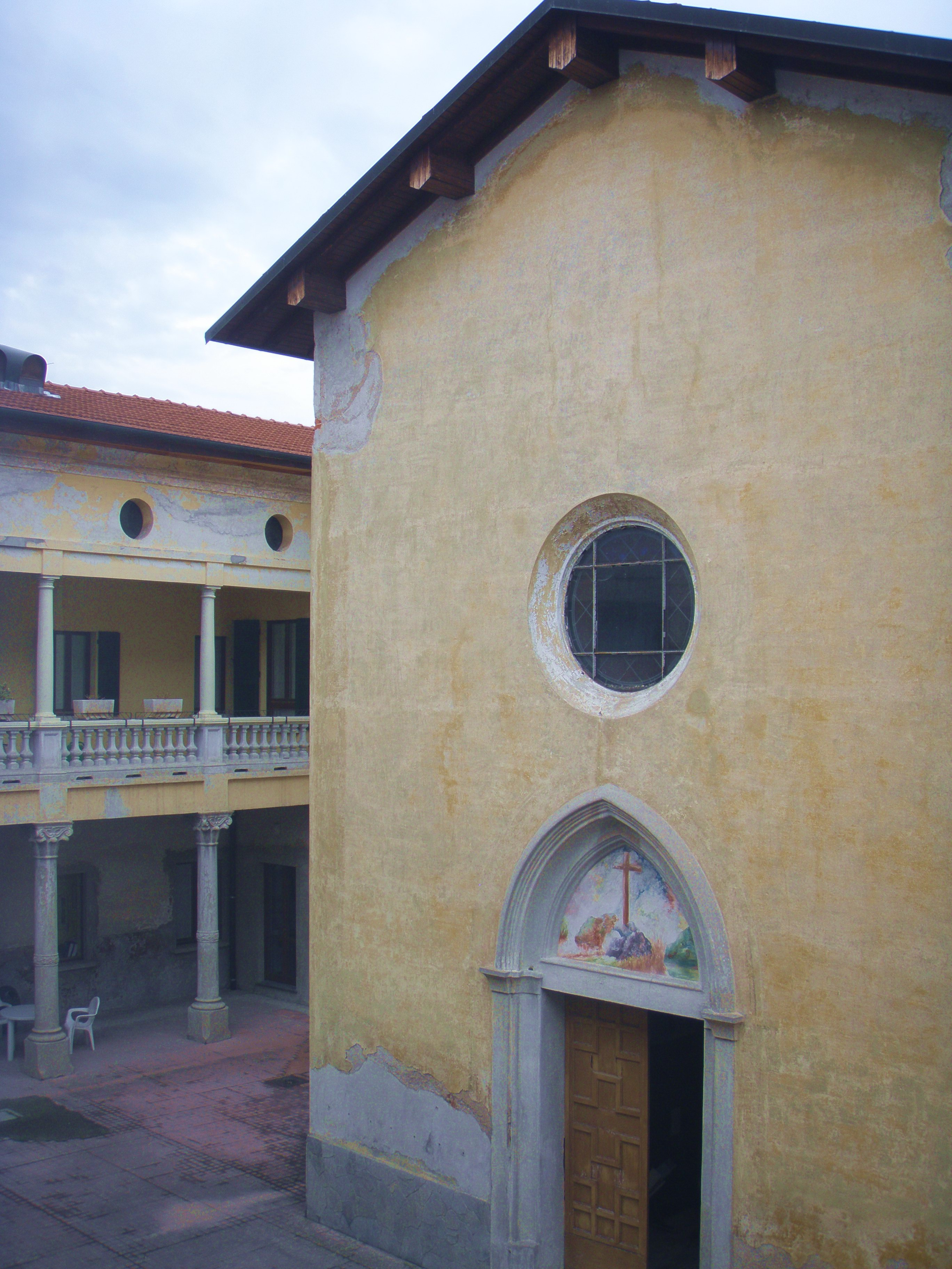 Fara Noverese, Castello Superiore (Castrum Novum), Chiesa di S.Gerolamo.